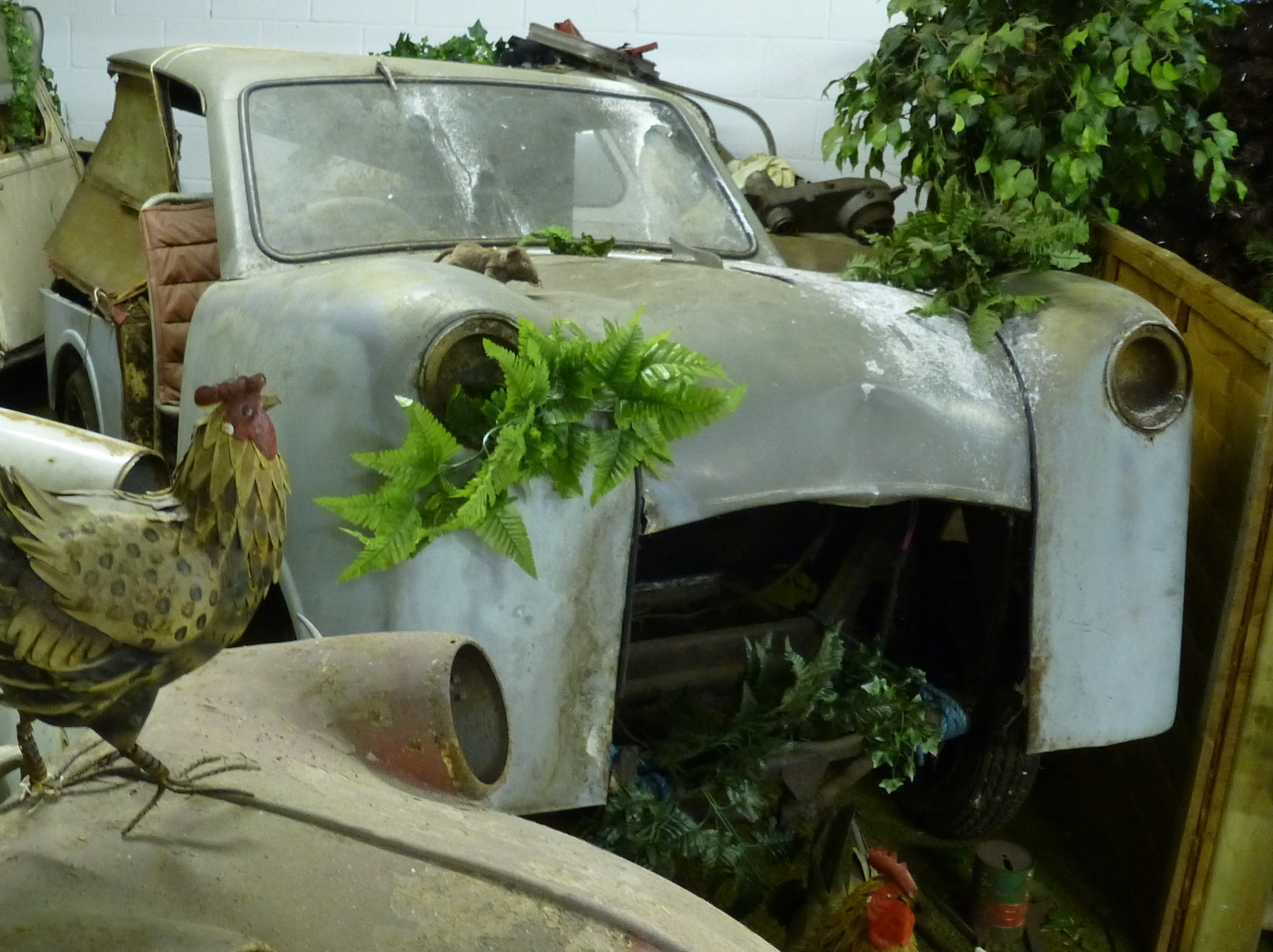 Astra